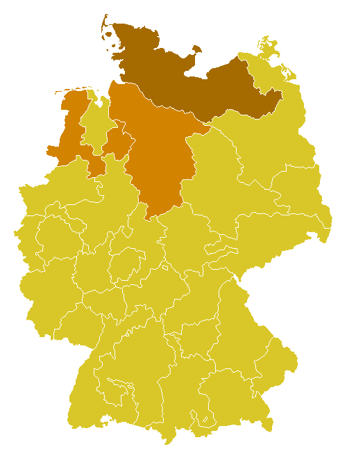 Kirchenprovinz Hamburg Basiert auf GFDL-Vorlage.